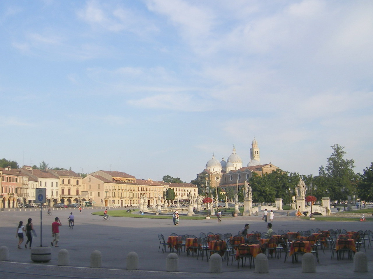 Padova - Prato della Valle